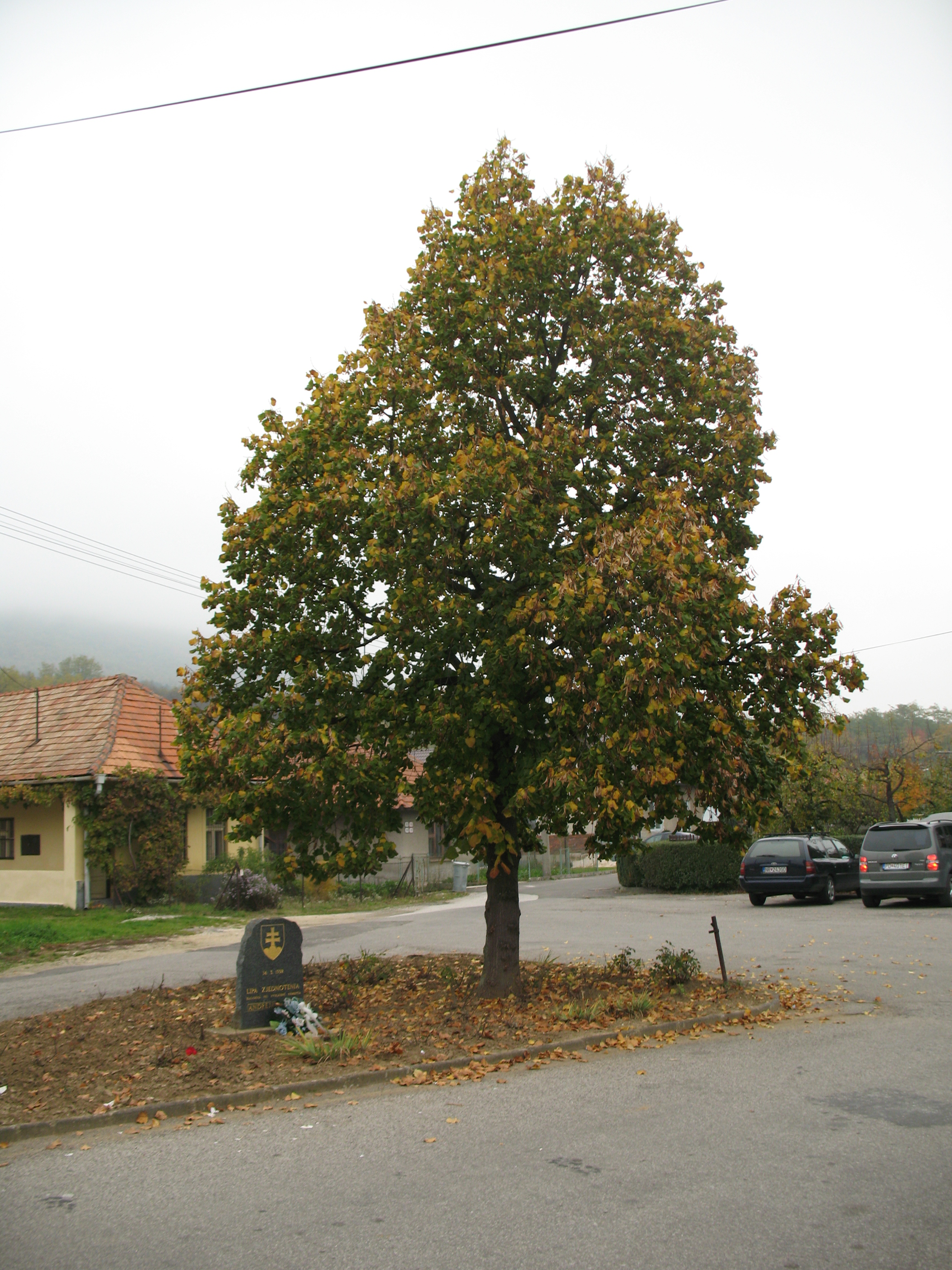 Alsóvesztény